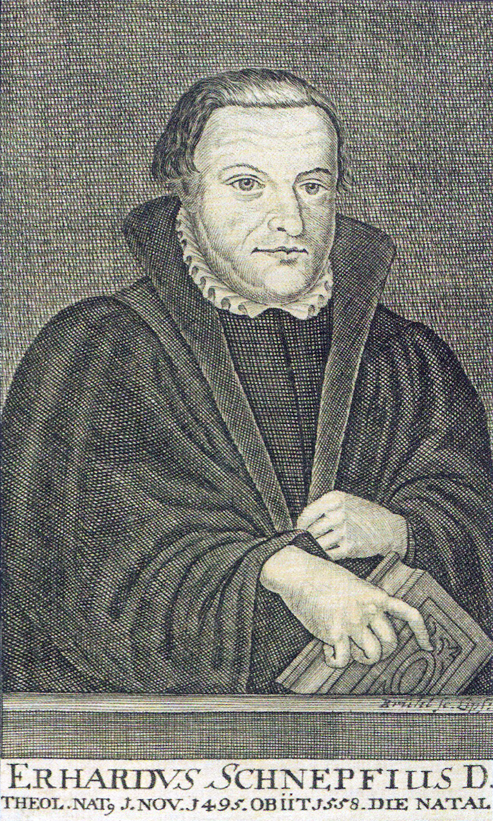 Erhard Schnepf (1495–1558) deutscher Theologe und Reformator, Kupferstich